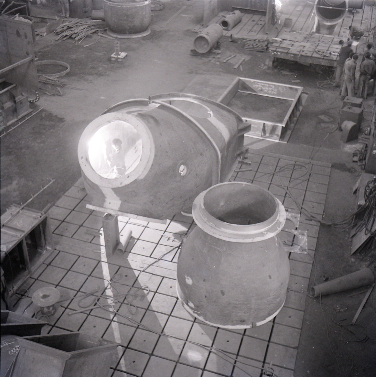 Servizio fotografico : Legnano, 1958 / Paolo Monti. - Buste: 10, Fototipi: 10 : Negativo b/n, gelatina bromuro d'argento/ pellicola ; 6x6. - ((Serie costituita da 10 buste di carta, tenute insieme da una graffetta, identificate con i una doppia numerazione: R21823BIS/ R575, R21824BIS/ R574, R21825BIS/ R573, R21826BIS/ R572, R21827BIS/ R571BIS, R21828BIS/ R571, R21829BIS7 R570, R21830BIS/ R569, R21831BIS/ R568, R21832BIS7 R567BIS. - Fonte: Agenda di Paolo Monti: Foto Leica 1 / 1-51 verde, 1-110 nera (1958-1963), presso Archivio Paolo Monti